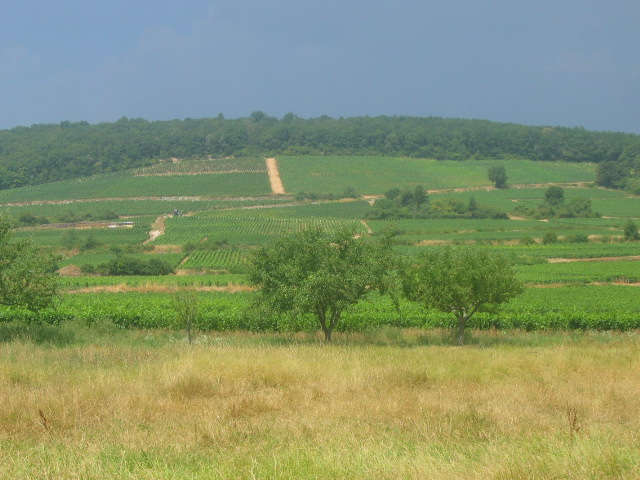 Vignoble de Fixin, Bourgogne, France.